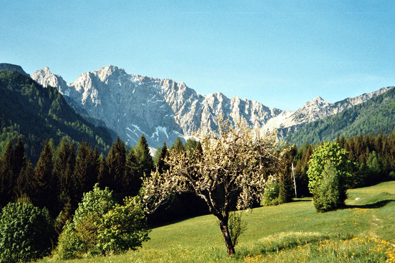 Blick auf die Vertatscha vom Bodental aus (südlicher Abschluss des Bodentals)